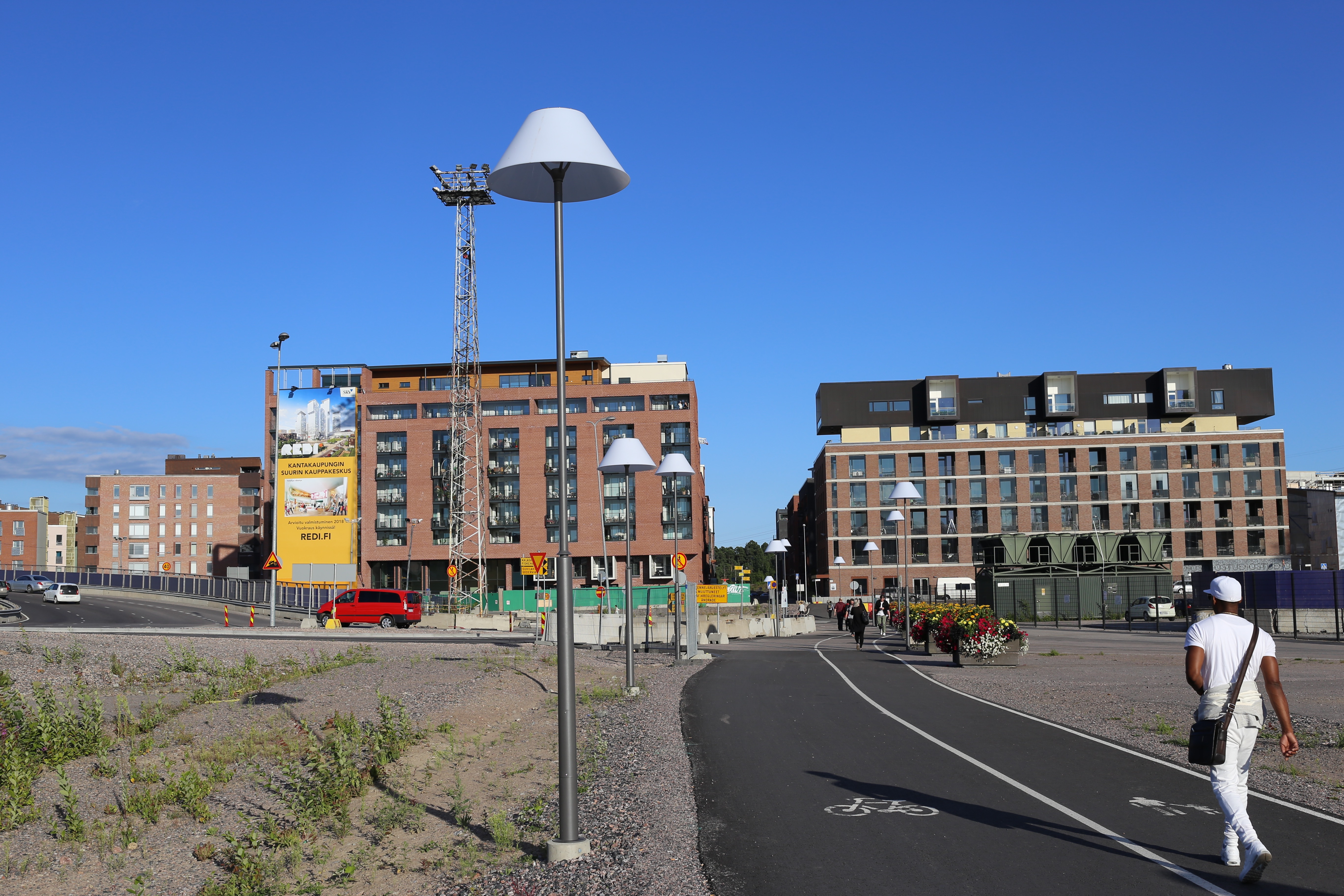 Kalasatamaa